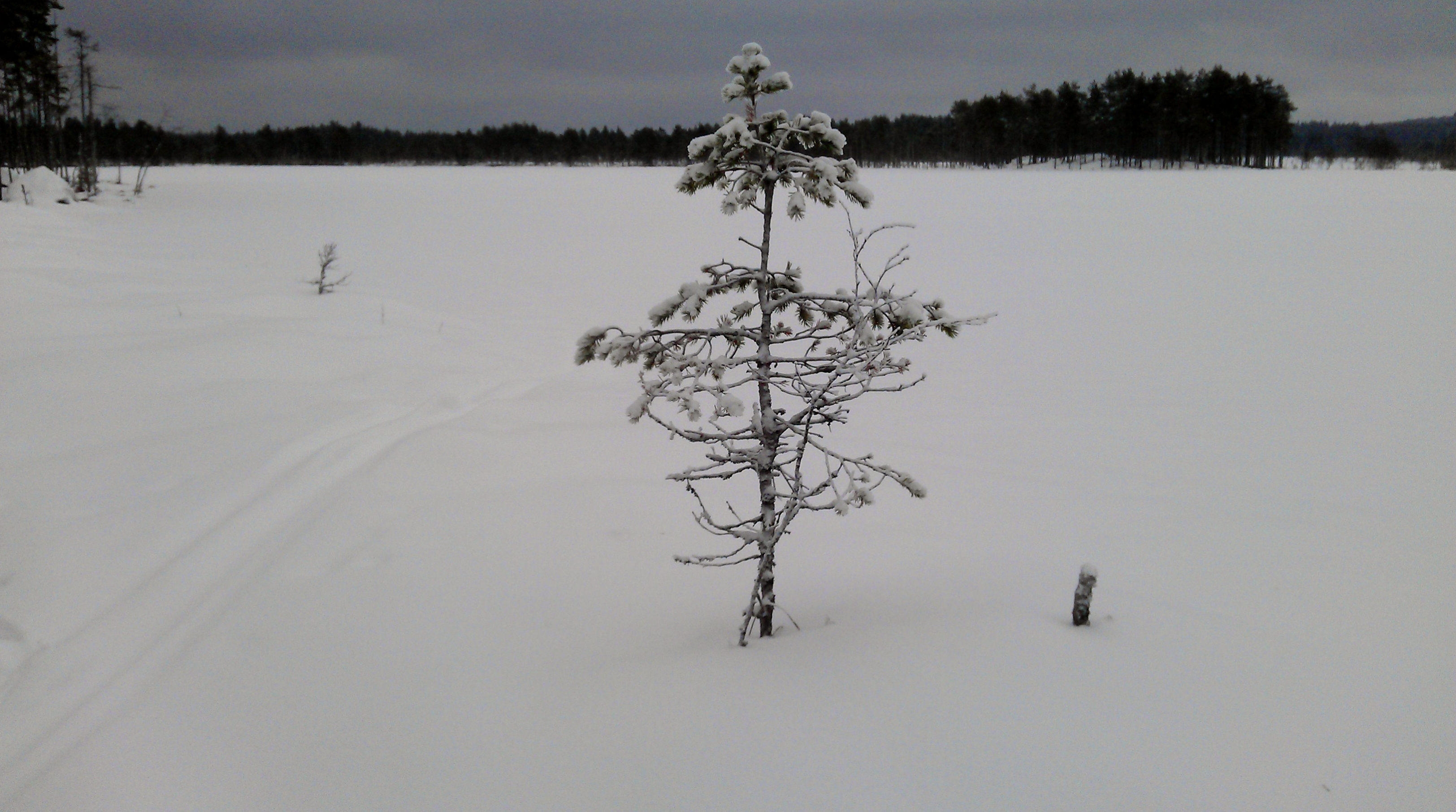 Langtjern på Lierfoss i Aurskog-Høland kommune.